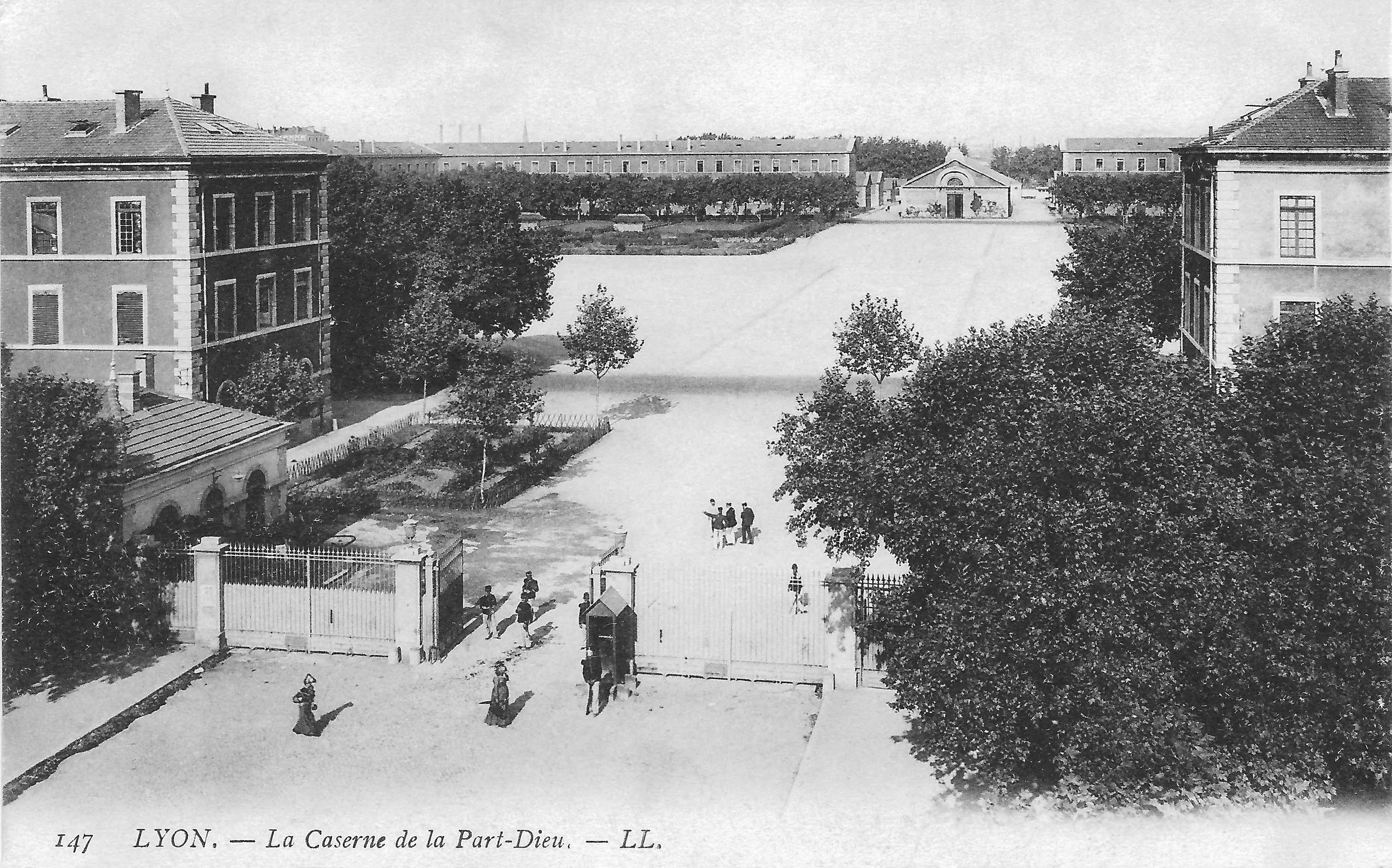 Briefkaart van de kaserne bij Part-Dieu